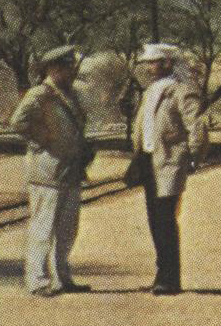 Ausschnitt aus dem Foto "Bahnstation Ababis" aus Kurd Schwabe (Hrsg.), Die Deutschen Kolonien, Bd. 1, Berlin 1909/1910, S. 133